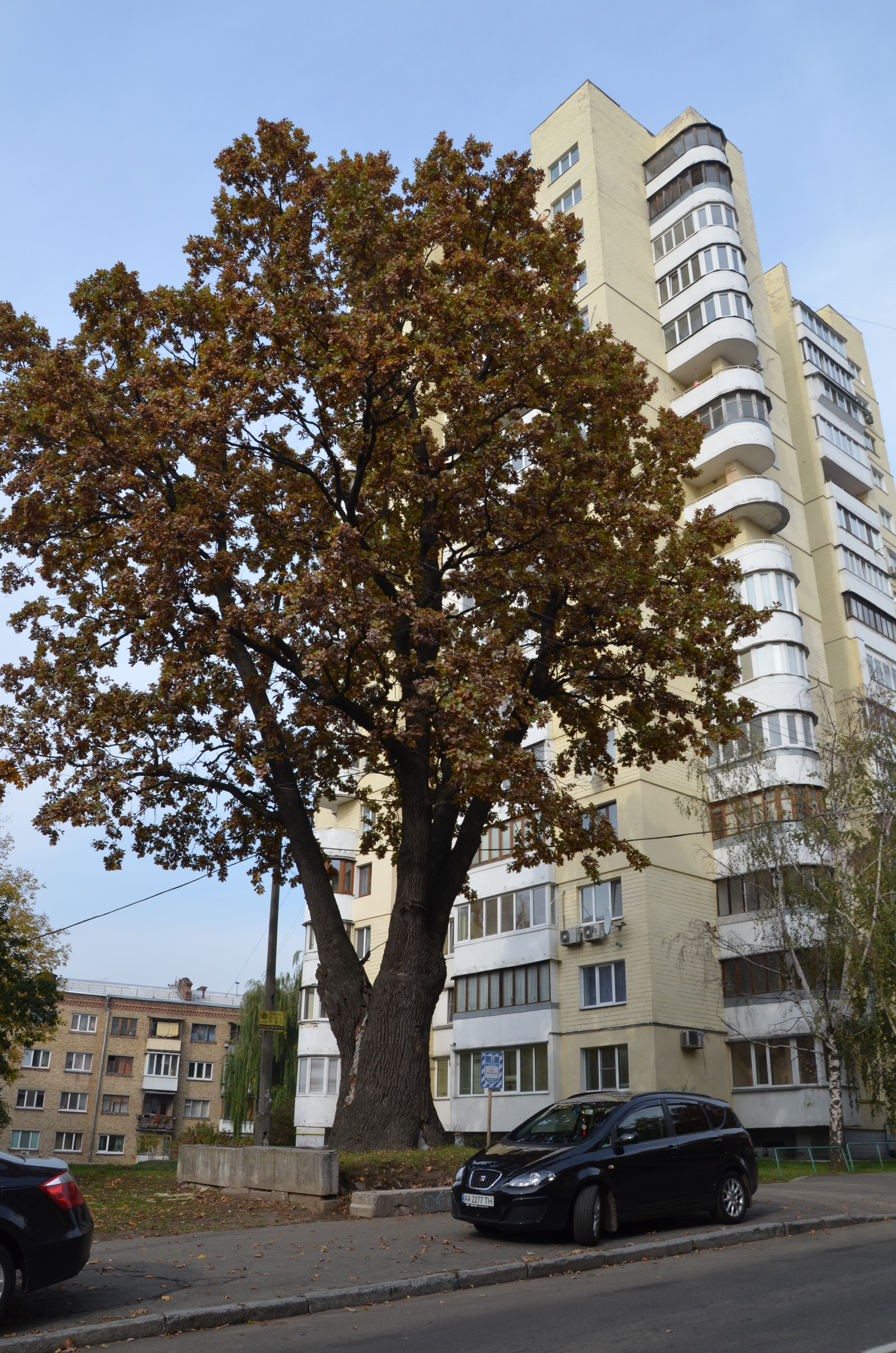 Дуб Корольова, Солом'янський район, вул. Академіка Янгеля, 14/1